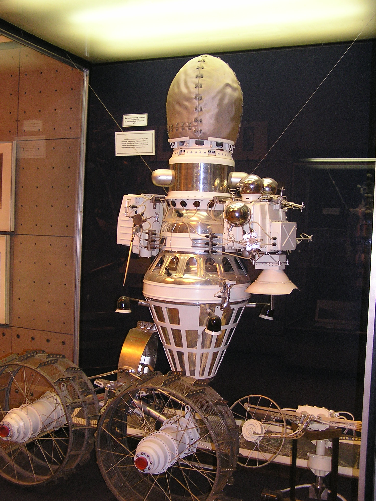 Музей космонавтики и ракетной техники (в Иоанновском равелине Петропавловской крепости). Модель автоматической станции Луна-9 с посадочной ступенью This photograph was taken in Museum of Space and Missile Technology (Saint Petersburg) Object location59° 57′ 07″ N, 30° 19′ 16″ E